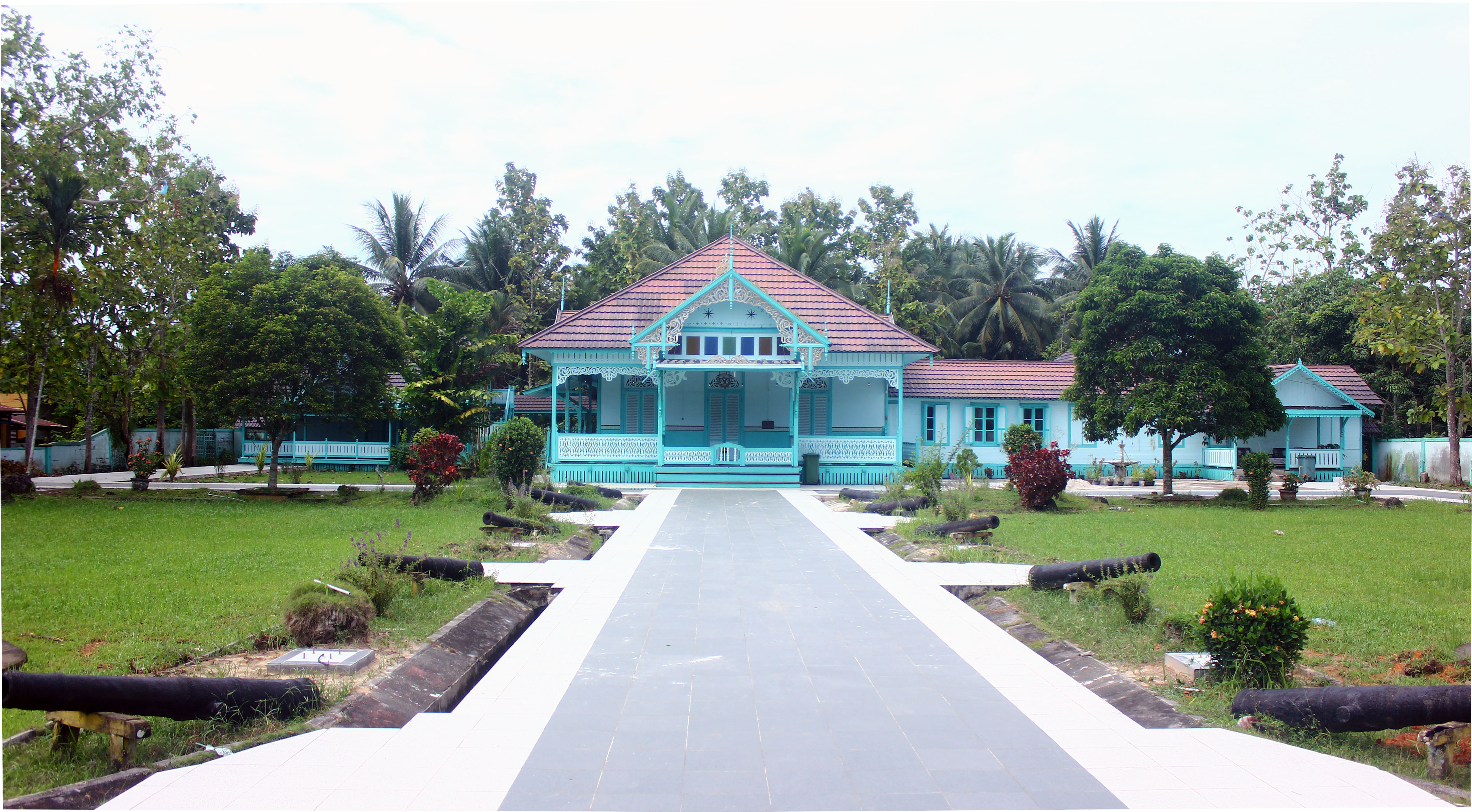 Istana Amantubillah Mempawah